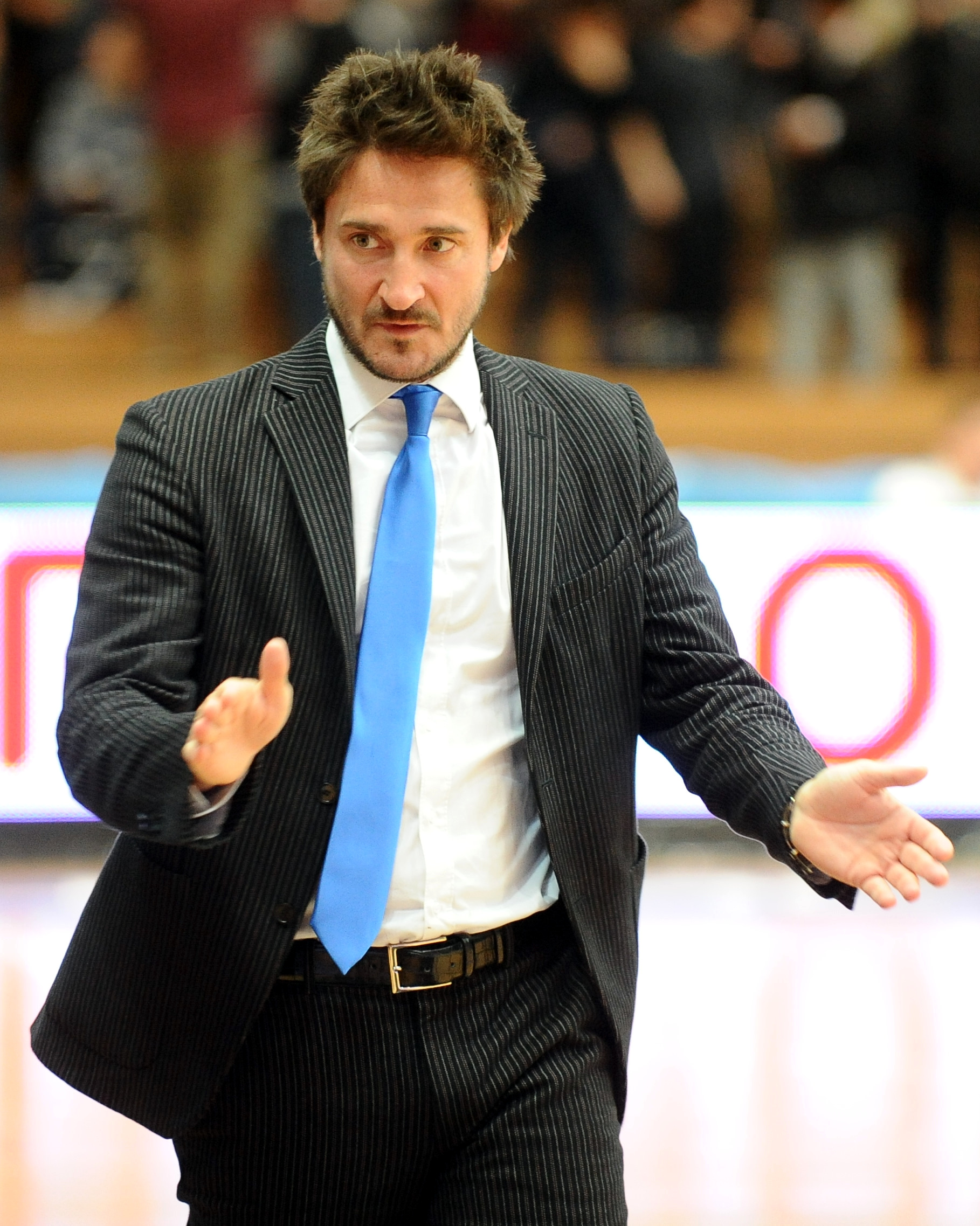 Gianmarco Pozzecco al PalaTrento.